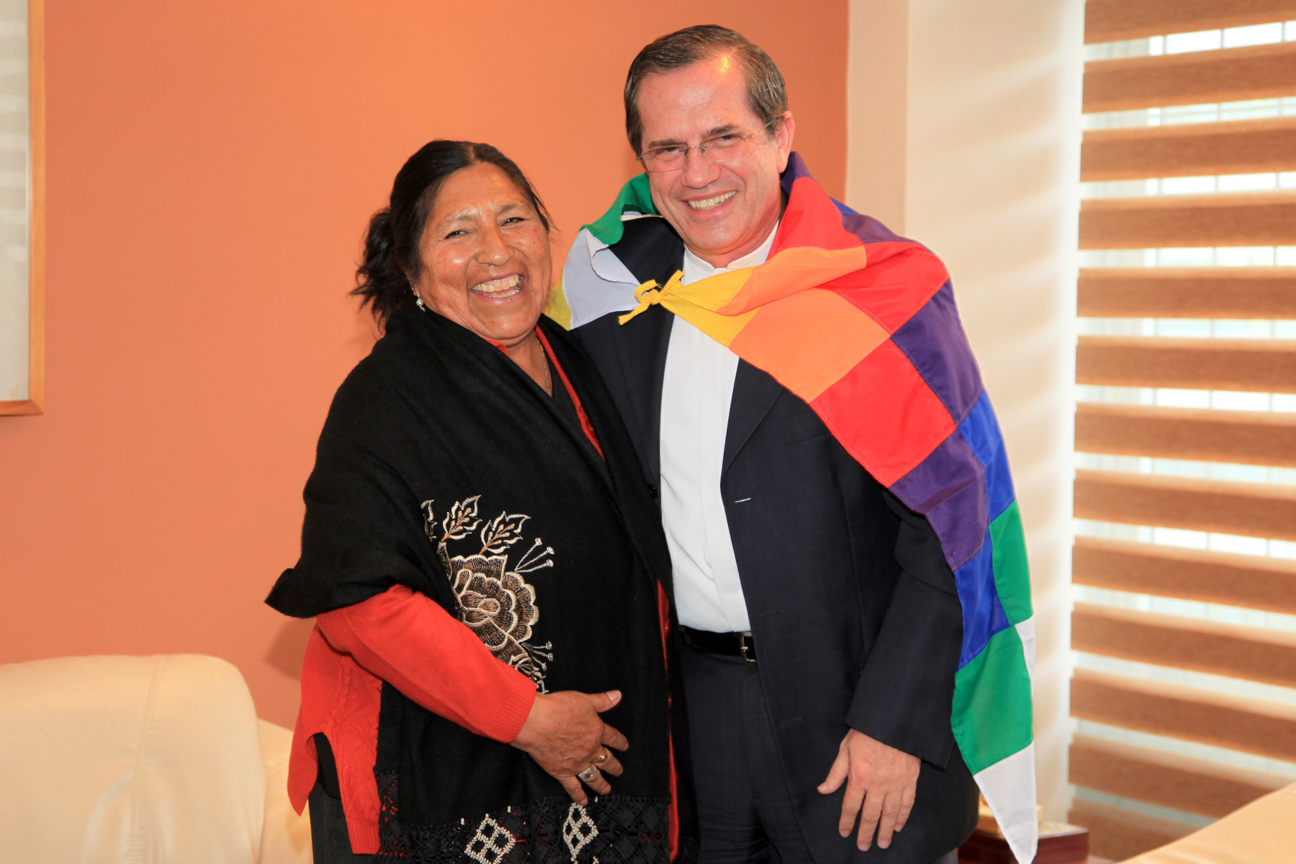 Quito (Ecuador), 18 de Septiembre del 2012.- Esther Morales, hermana del presidente de Bolivia Evo Morales se reunió con el Canciller Ricardo Patiño. Foto: Xavier Granja Cedeño/Ministerio de Relaciones Exteriores, Comercio e Integración